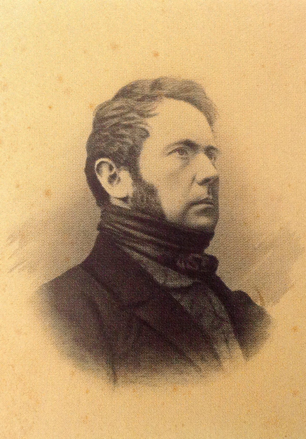 Friedrich Christoph Dahlmann